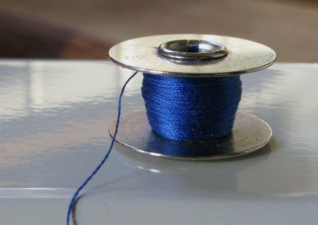 Spillchen.